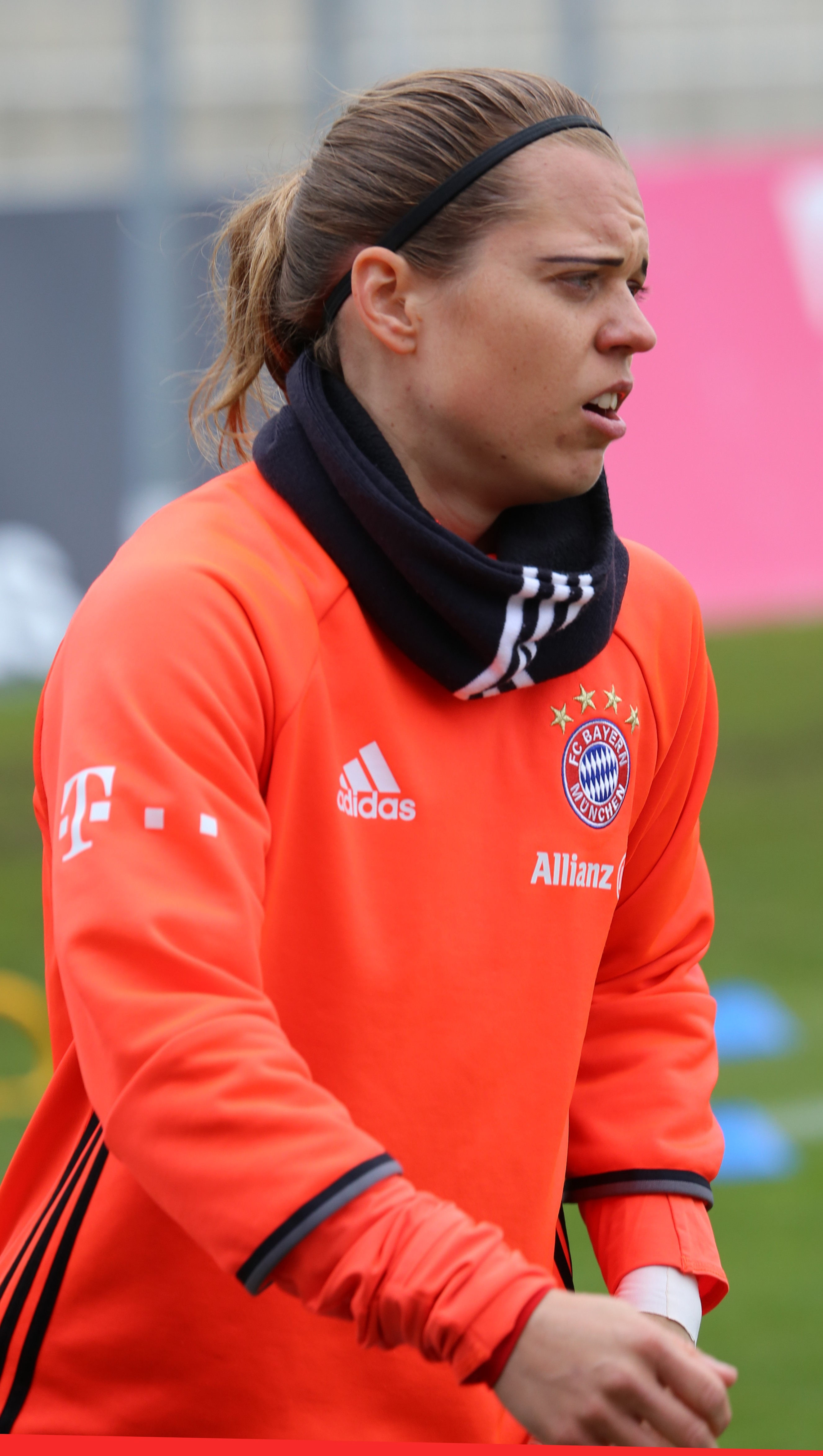 Katharina Baunach (FC Bayern München) beim Aufwärmen vor dem Frauen-Bundesliga-Spiel FC Bayern München gegen 1. FFC Frankfurt am 13. November 2016 im Stadion an der Grünwalder Straße, München (Ergebnis war 1:0).